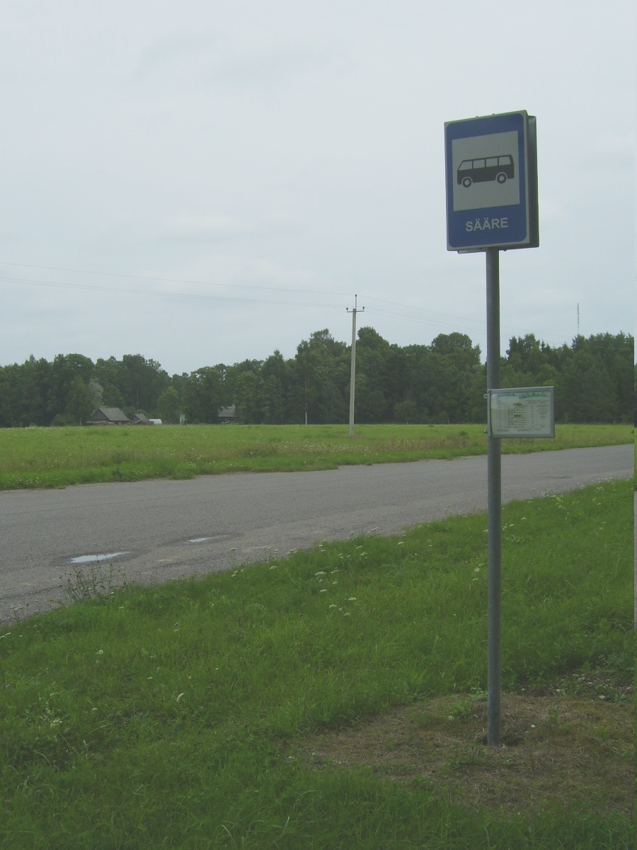 Partsi-Kuri tee, Sääre bussipeatus, Harju küla